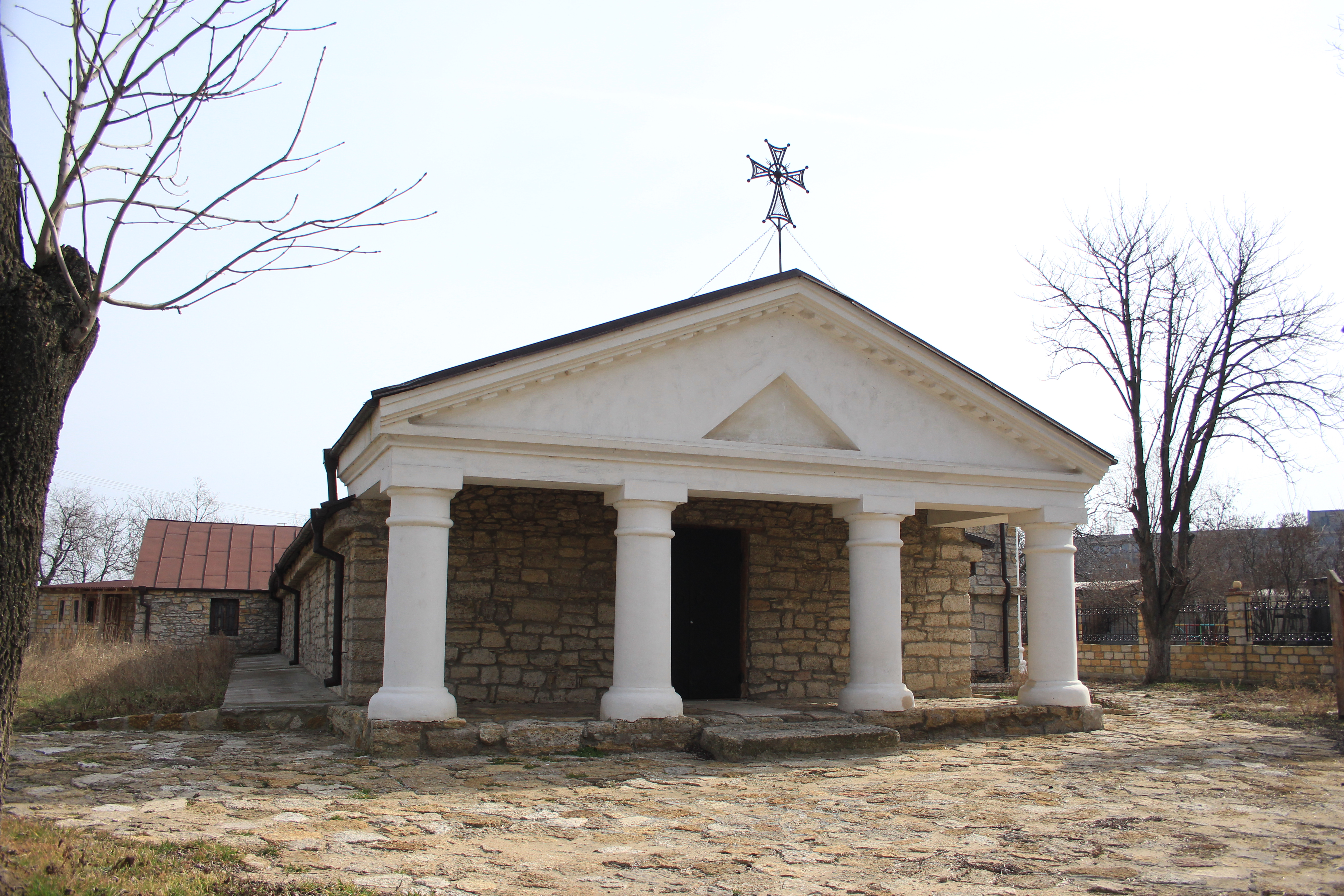 Церква Успіння Пресвятої Богородиці (вірменська), Білгород-Дністровський, вул. Кутузова, 1